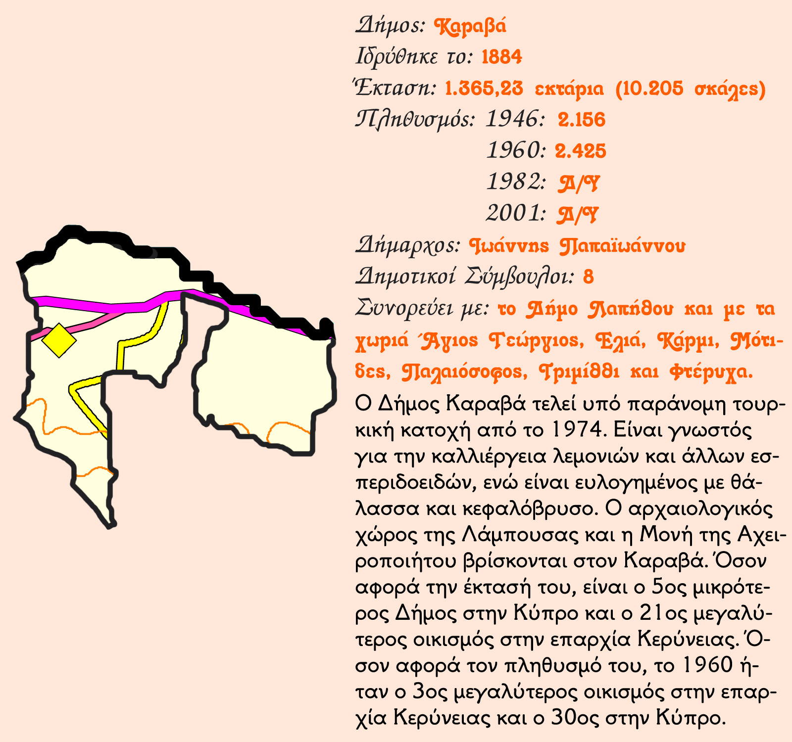 Συνοπτική παρουσίαση του Καραβά